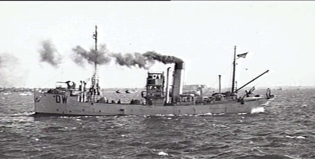 HMSS Durraween